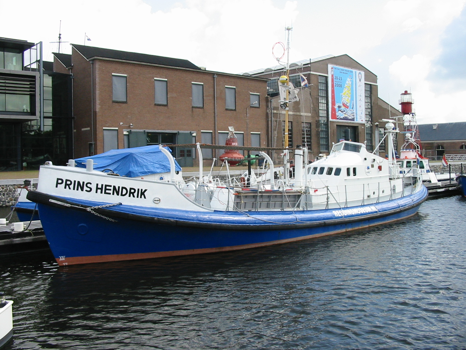 Museumreddingboot Prins Hendrik Lifeboat Prins Hendrik, now decommissioned from the Koninklijke Nederlandse Redding Maatschappij